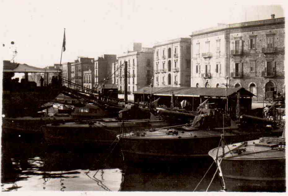 Motoscafi armati siluranti della IIª Flottiglia MAS, di stanza nel porto di Trapani, nel 1941